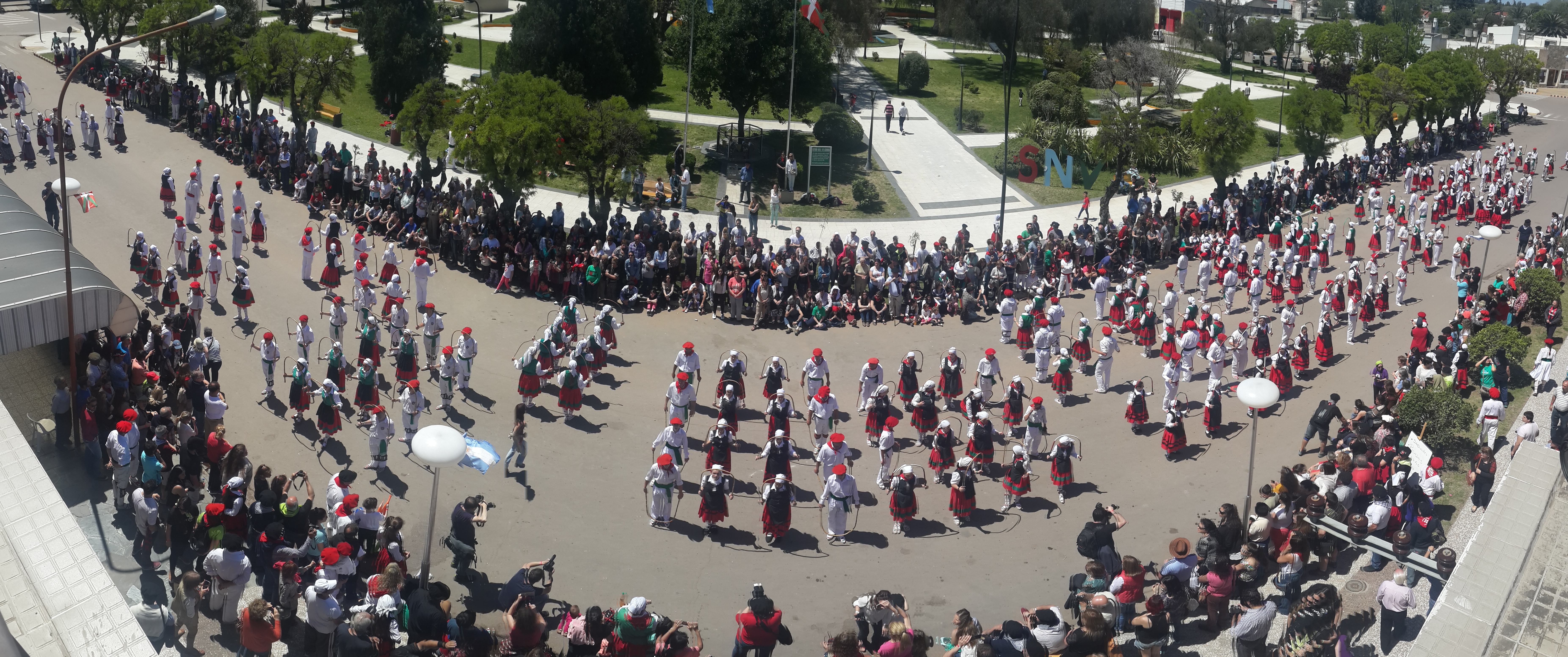 Calle